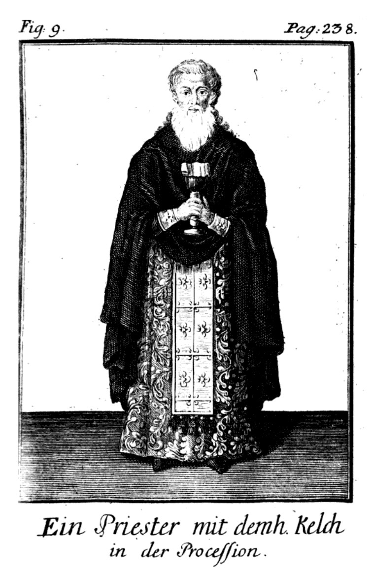 Documentu conţine imaginea unui preot grec de la 1700